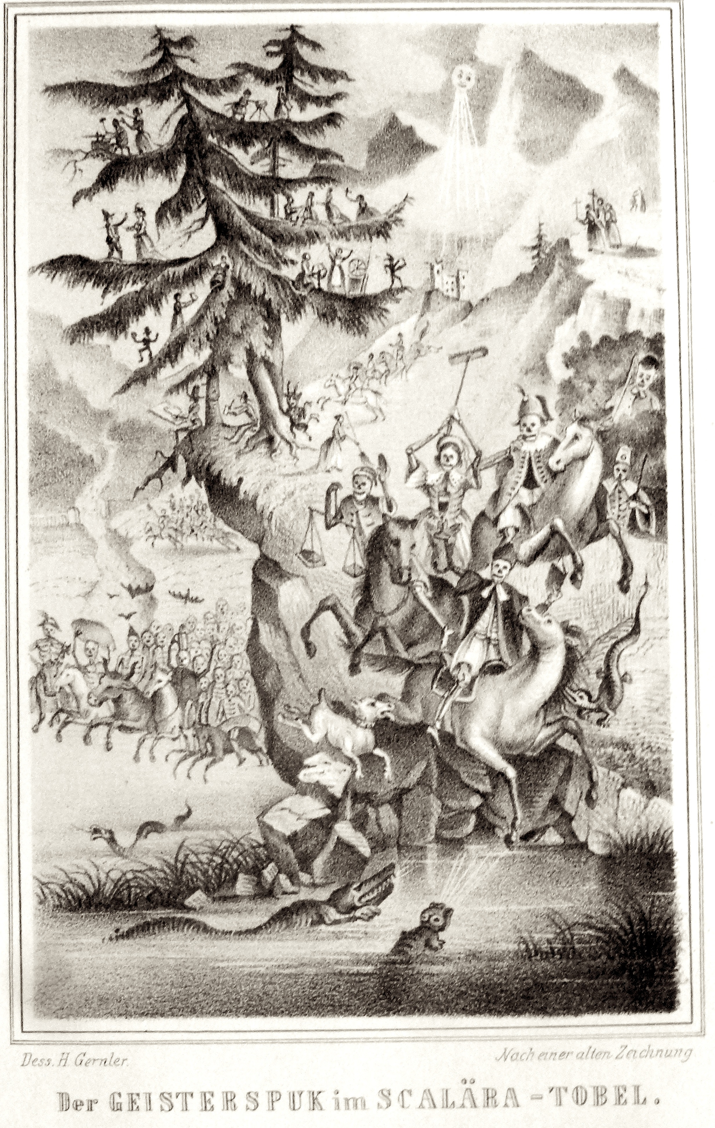 Litho: Geisterzug im Scaläratobel